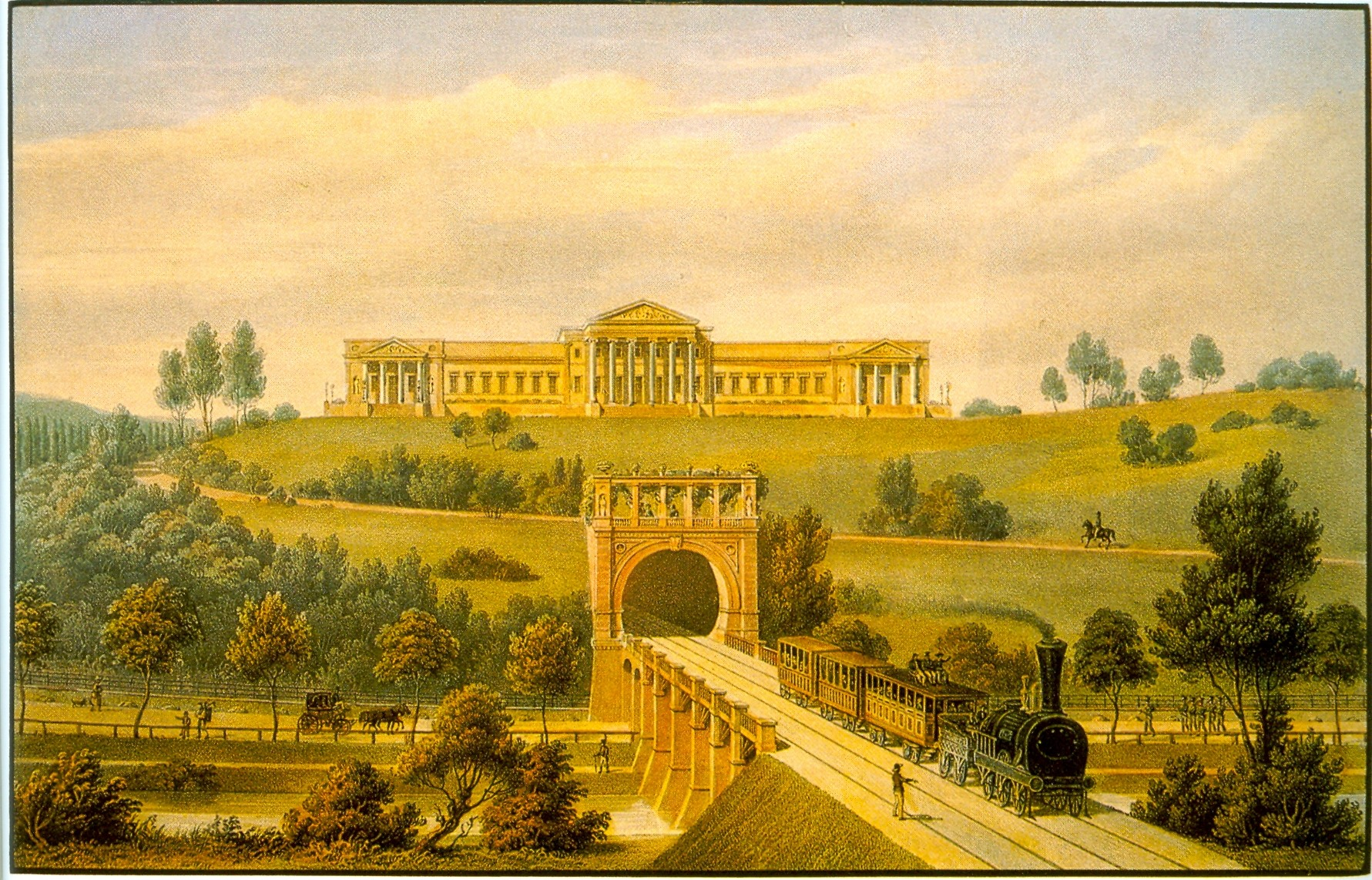 Landhaus Rosenstein mit Centralbahn-Tunnel (gebaut 1846) zur Zeit der Eröffnung der Eisenbahnlinie Stuttgart-Esslingen. Ansichtskarte von 1910. Lithographie von Eberhard Emminger nach einer Zeichnung von Christian Friedrich von Leins.